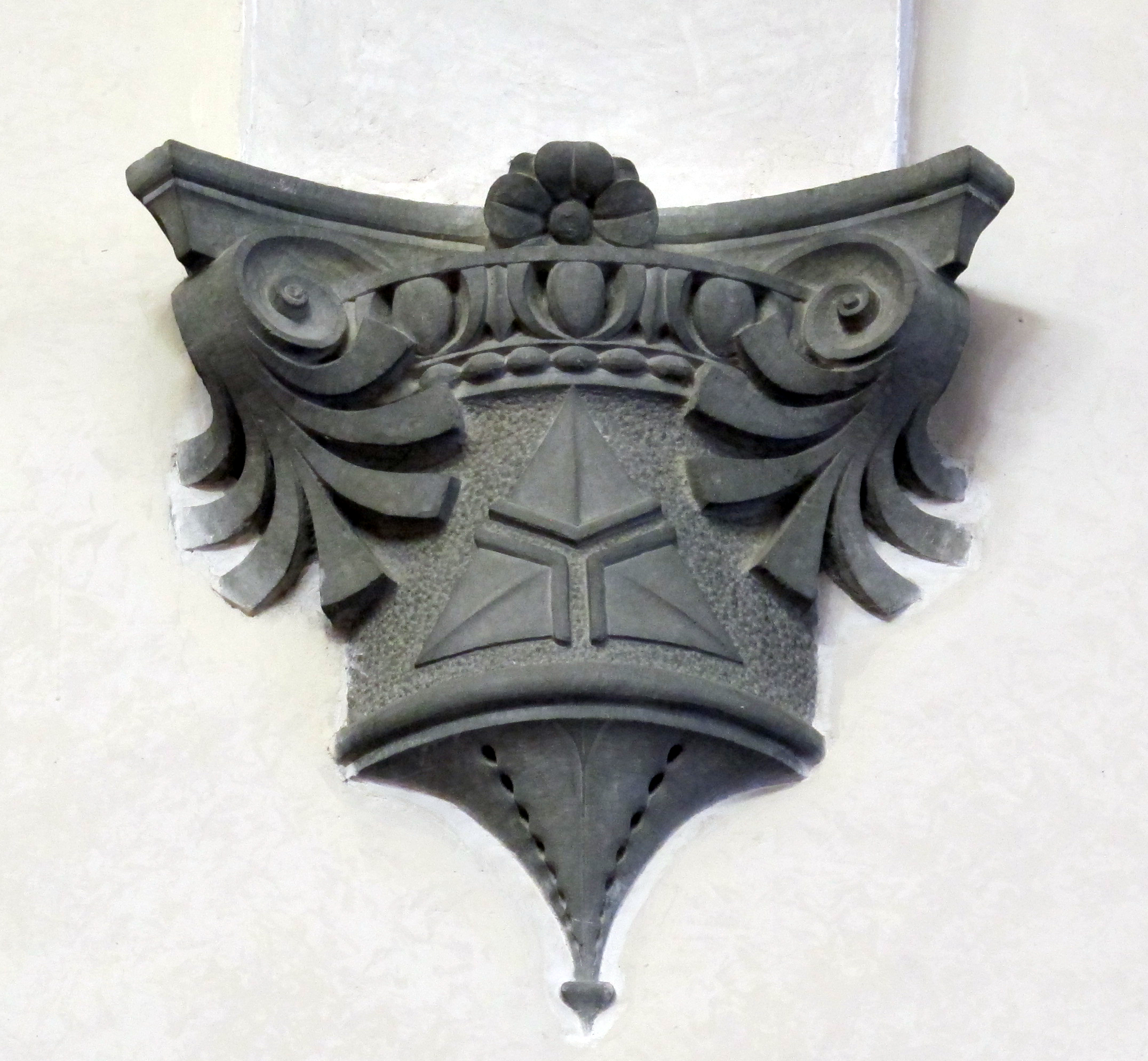 Villa Le Brache, Firenze